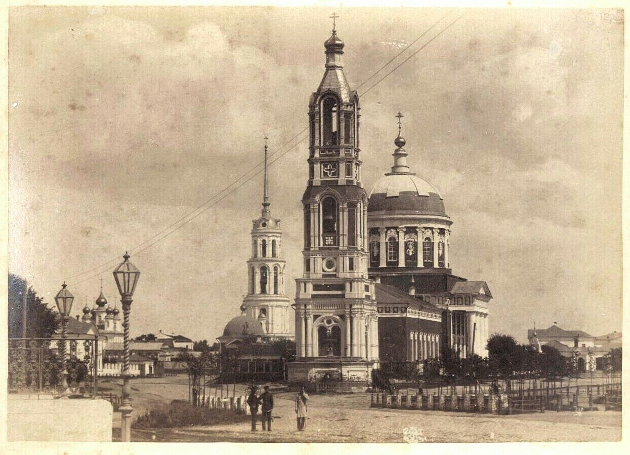 Соборный храм Спаса Преображения в Шуе. Разрушен большевиками. На его месте ныне -- памятник лысому коротышке